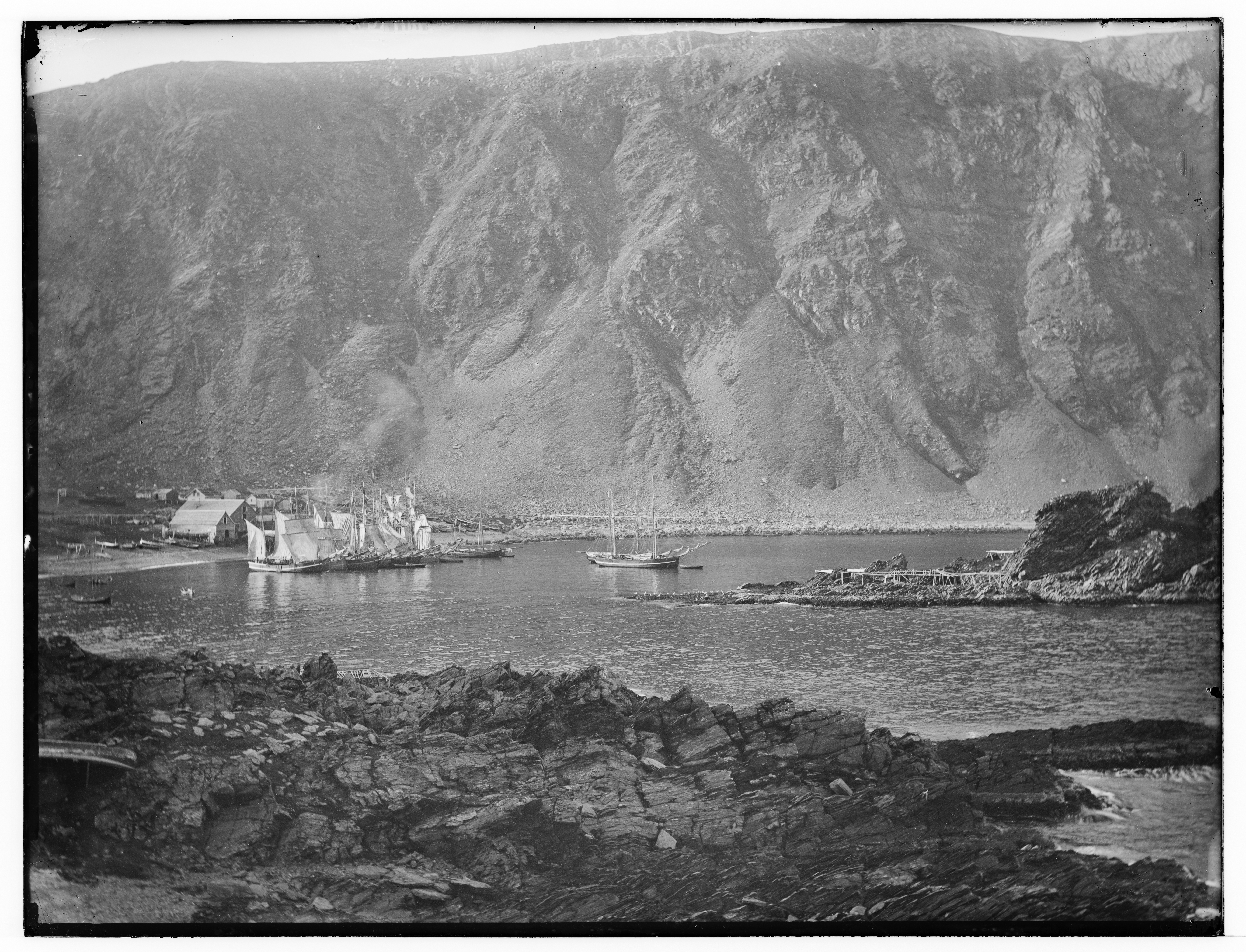 Bildet er hentet fra Arkivverket. Havnen, Kjelvik, Finnmarkens amt Arkivinstitusjon : Riksarkivet Arkivnavn : Havnedirektoratet Sted : Norge, Finnmark, Lebesby, Emneord: Sjø, Fjell, Båter Avbildet